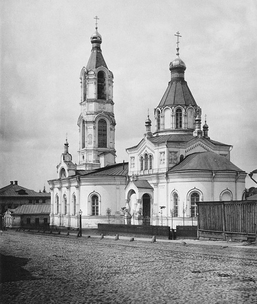 Храм Николая Чудотворца на Ямах (разрушен) (Москва, Николоямская улица, 39).